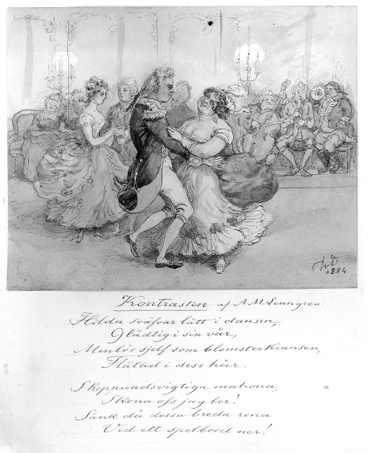 Illustration av dansande par till Anna-Maria Lenngrens "Kontrasten", av Fritz von Dardel. 1884.